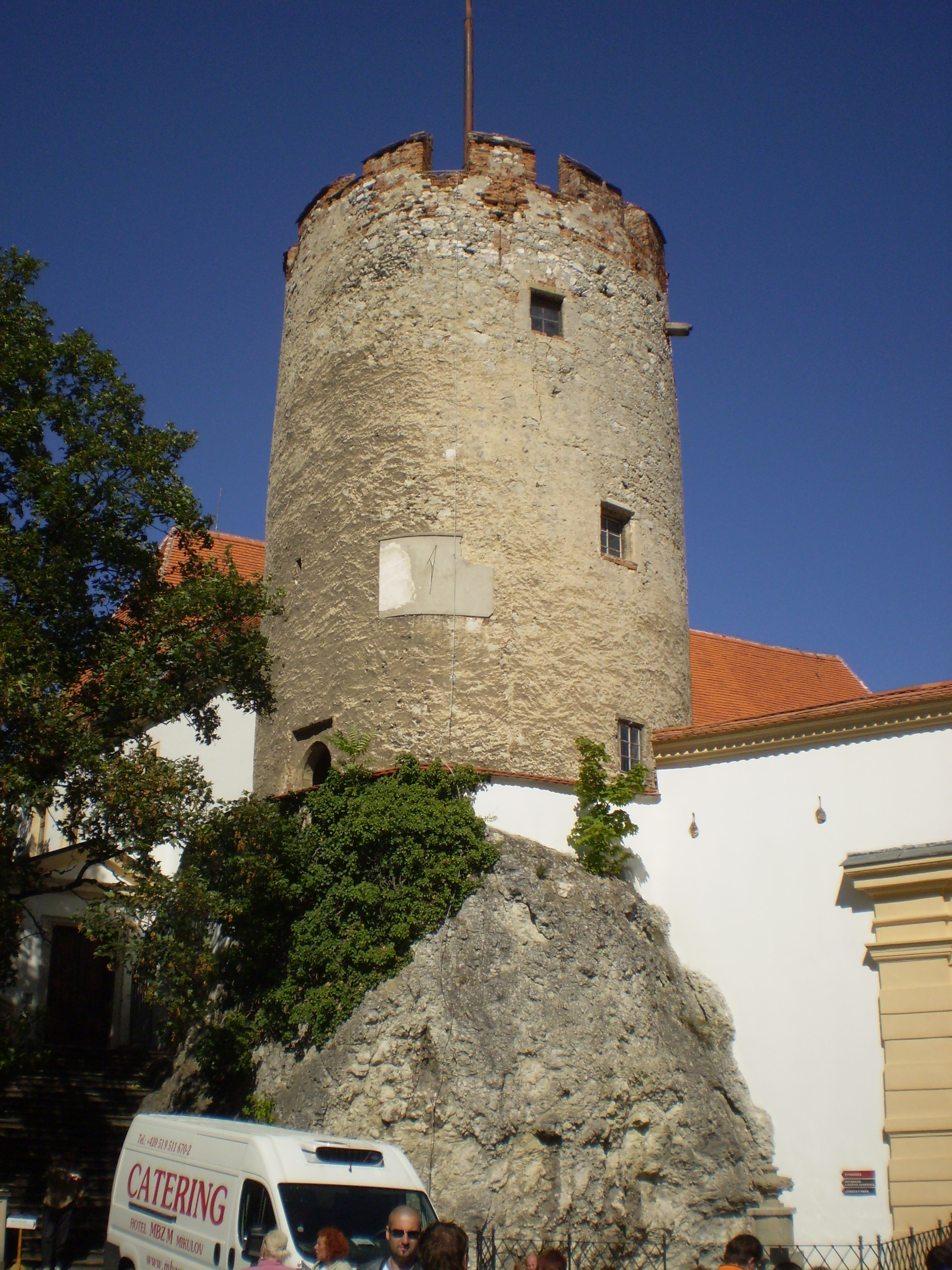 Věž zámku Mikulov.